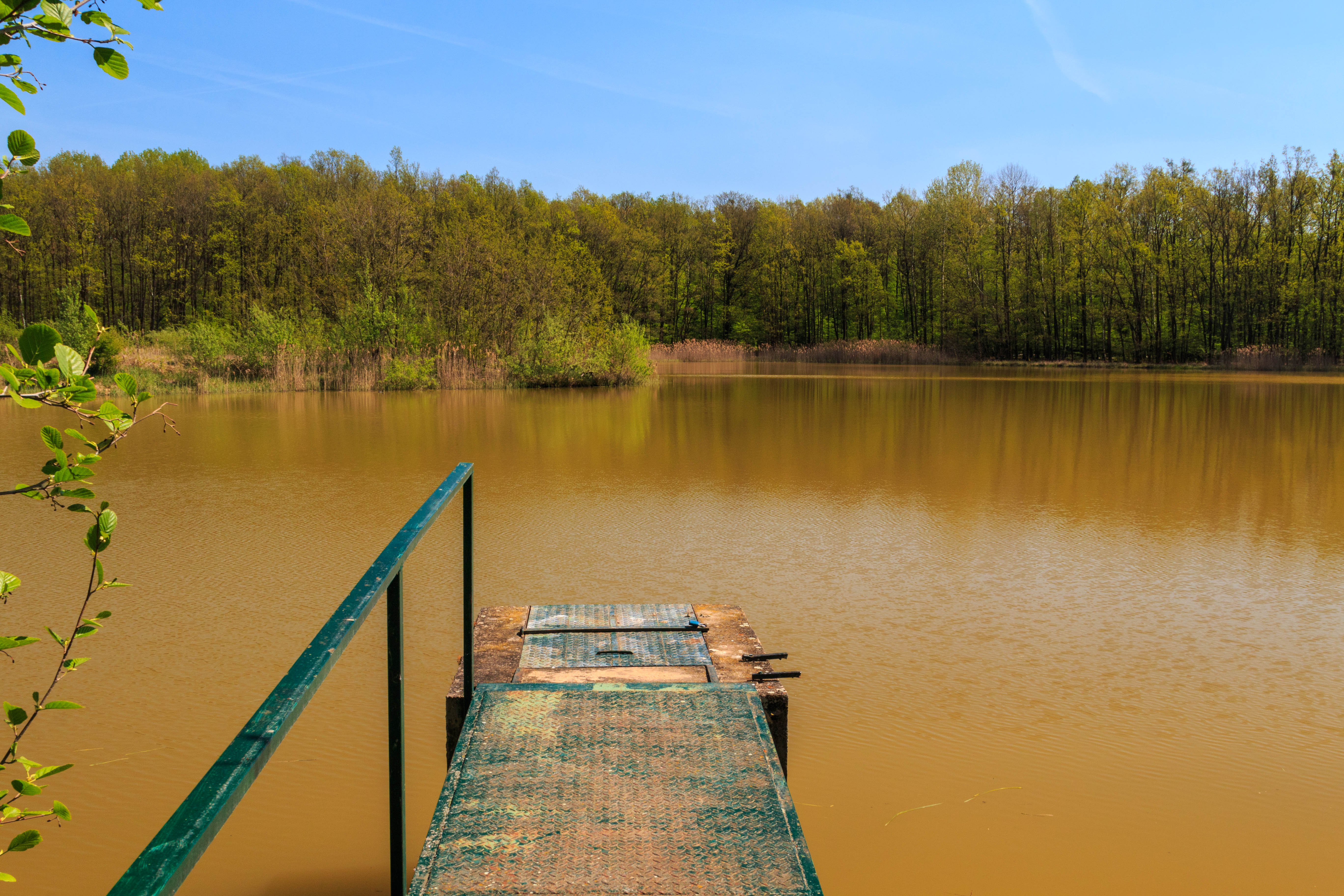 Rybník Řasov u obce Kobylice Project: Vodstvo.